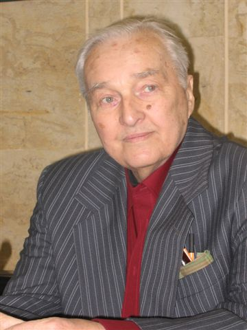 Ludwik Jerzy Kern (1920-2010), Polish writer